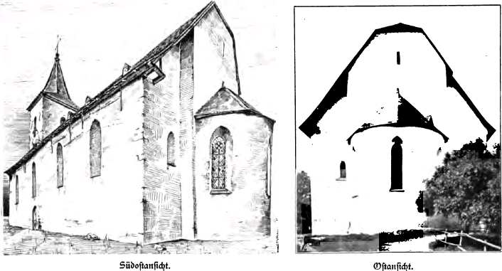 Evangelische Kirche Feudingen aus: Die Bau- und Kunstdenkmäler von Westfalen: Band 12: Kreis Siegen. Münster i.W.: Schöningh, 1903; S. 34